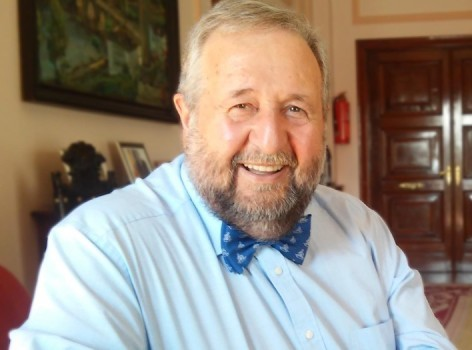 O político galego Xosé López Orozco nunha entrevista en 2015.